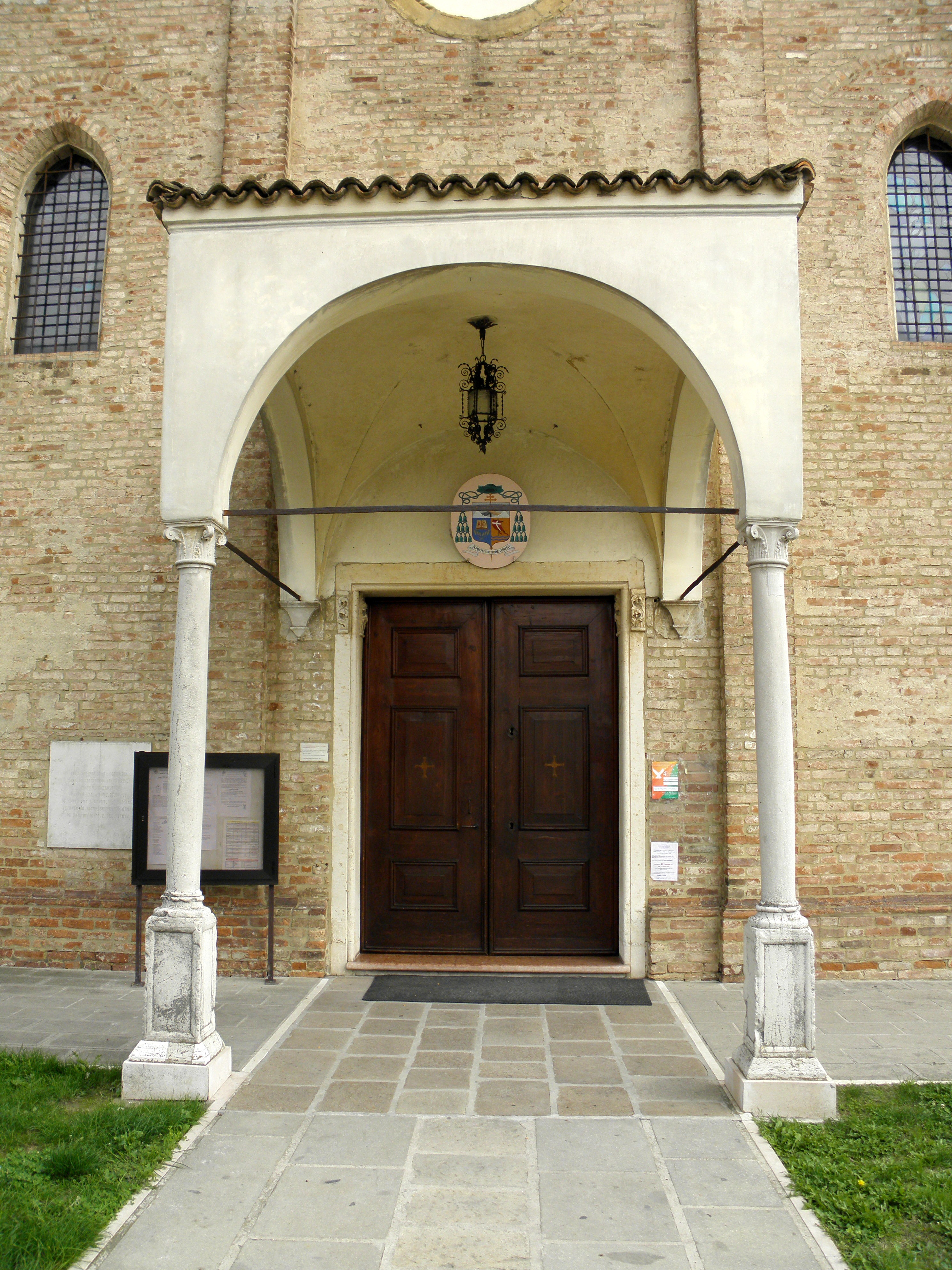 Scaltenigo, frazione di Mirano: la chiesa arcipretale della Cattedra di San Pietro Apostolo.